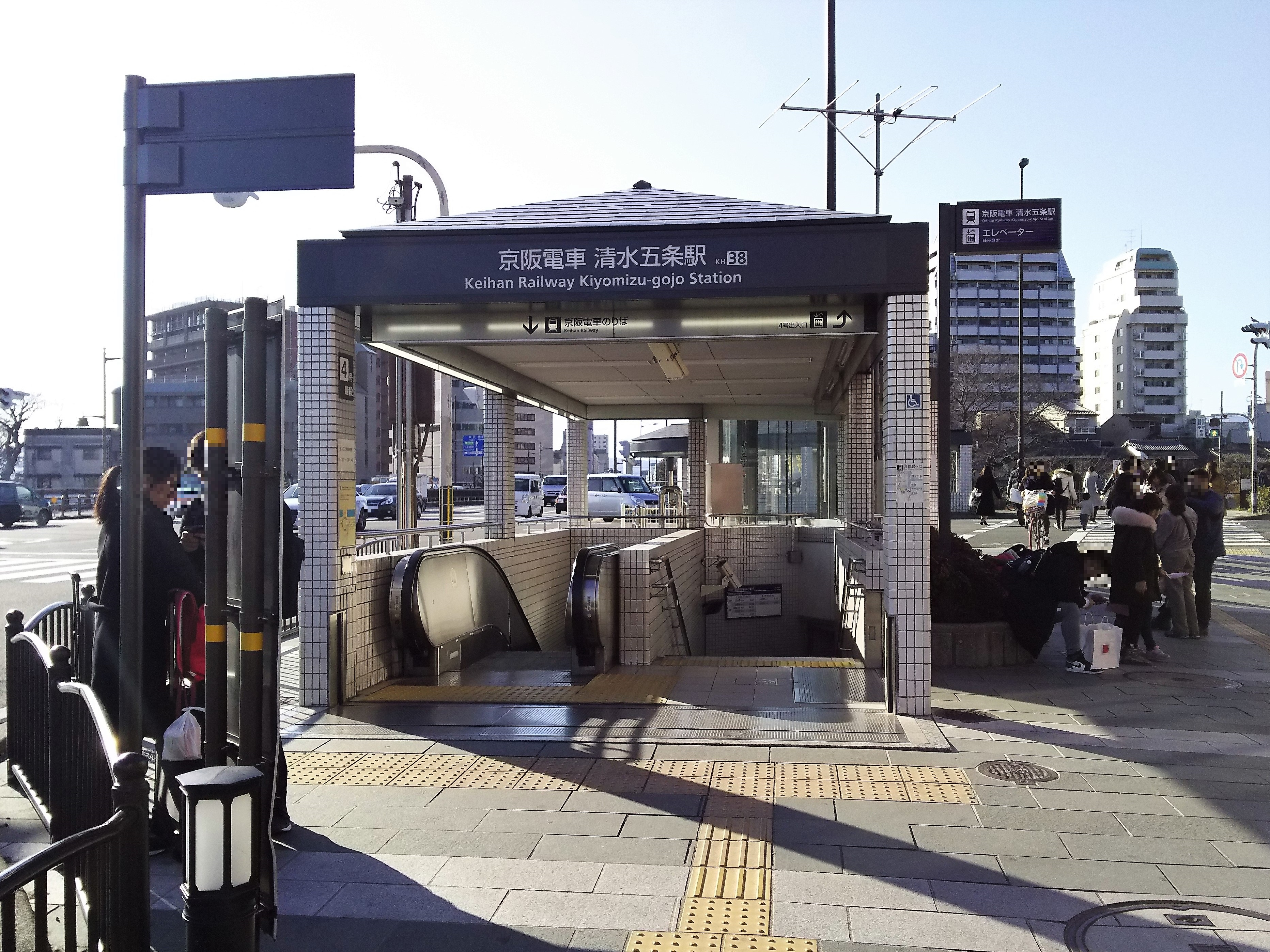 京阪本線清水五条駅出入り口（京都市東山区）